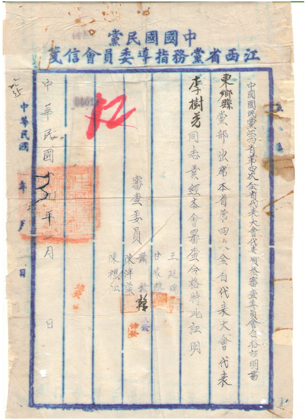 中文（中国大陆）: 民国19年的国民党江西省第四次全省代表大会代表资格证明书，规格为：20.0×32.5cm，纸张头衔为“中国国民党江西省党务指导委员会信纸”。内容为“中国国民党江西省第四次全省代表大会代表资格审查委员会合格证明书 东乡县党部出席本省第四次代表大会代表李树芳同志业经本会审查合格 特此证明 审查委员 王廷瑞 甘字馨 萧赣 陈泮藻 陈礼江 中华民国十九年一月 日”。落款日期上盖有方型“中国国民党江西省党务指导委员会印”，王廷瑞、甘家馨、陈泮藻姓名下盖有他们三人的私人印章，证明书空白处印有“旅发”、“津发”、“旅费 发”等字样。